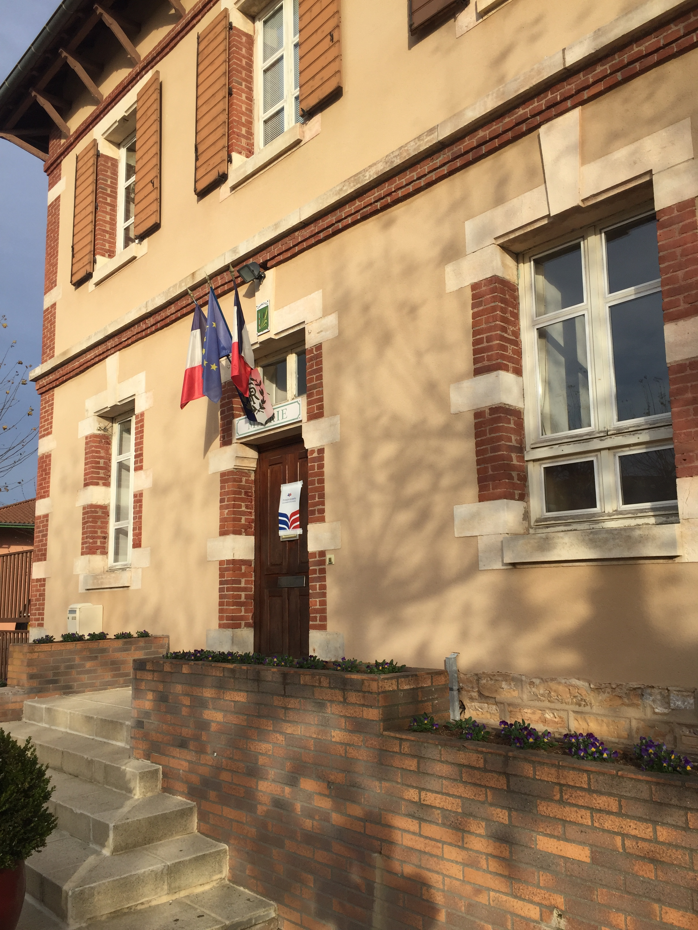 Mairie de Tramoyes (1er tour, primaire de droite et du centre).